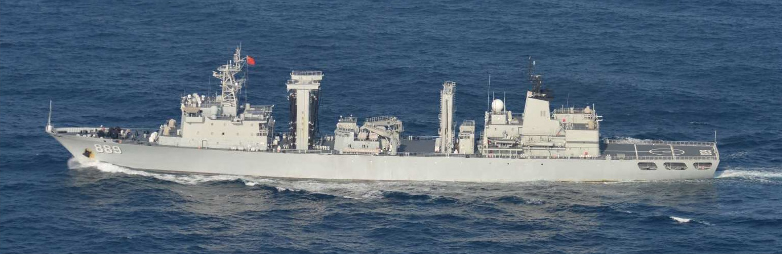 中文（台灣）: 903型綜合補給艦 舷號889太湖艦